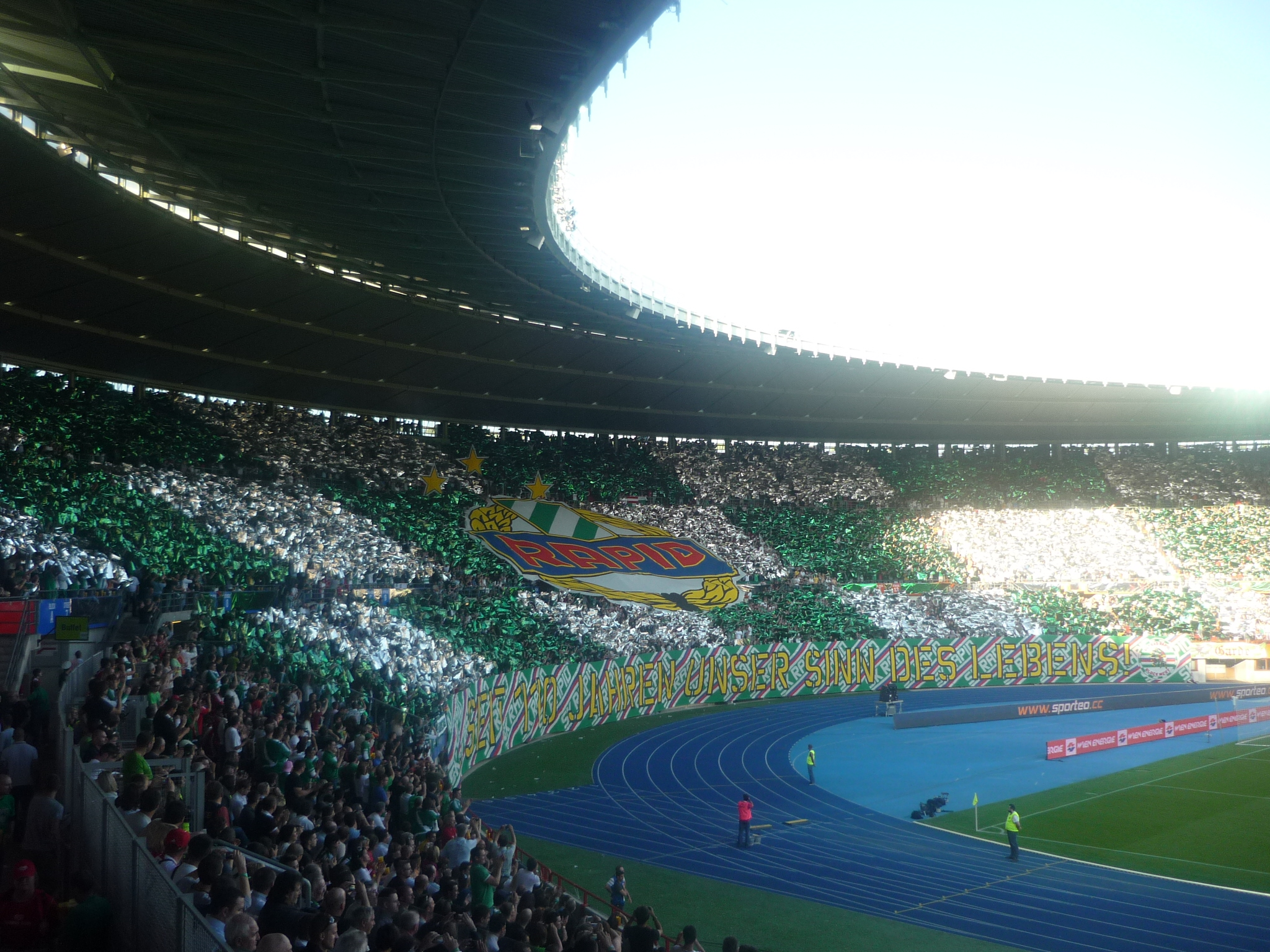 Eine Rapid Wien Choreografie im Wiener Ernst-Happel-Stadion.